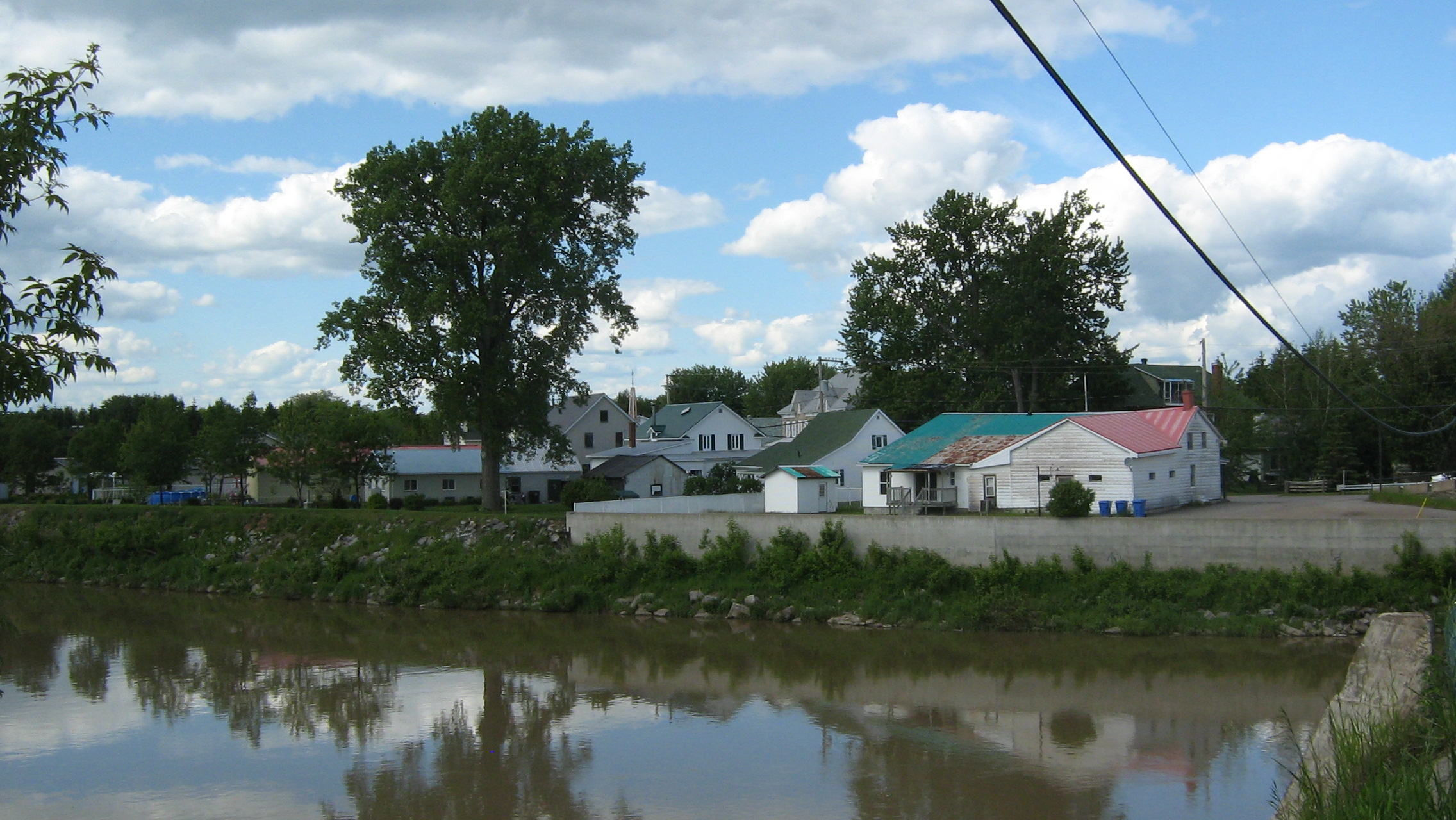 Vu du village de Bécancour, au Québec (Canada)